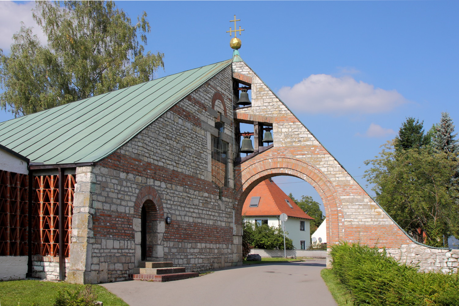 moderner Kirchenbau, 1957/58 nach Plan des Regierungsbaumeisters Olaf-Andreas Gulbransson/München, am Eingang des ehem. Fort VIII der 1880 errichteten Festung Ingolstadt und aus Materialien dieses Forts (Kalkstein und Backstein) errichtet, im Grundriß und Aufriß aus Dreiecksformen und in Adaption an Festungsarchitektur schlicht gestalteter Bau;This is a photograph of an architectural monument.